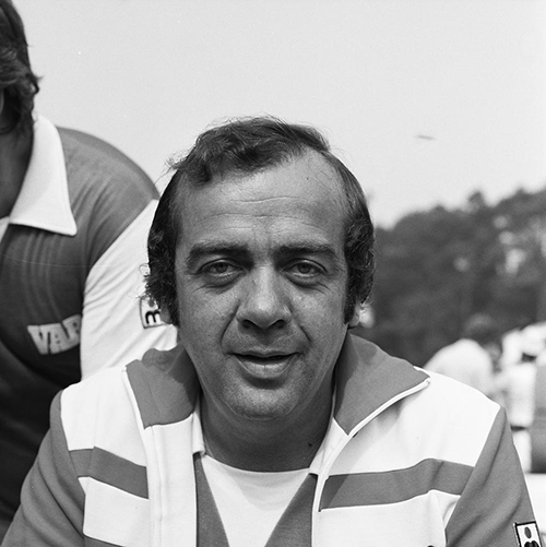 Frits Bom in AVRO's Sterrenslag